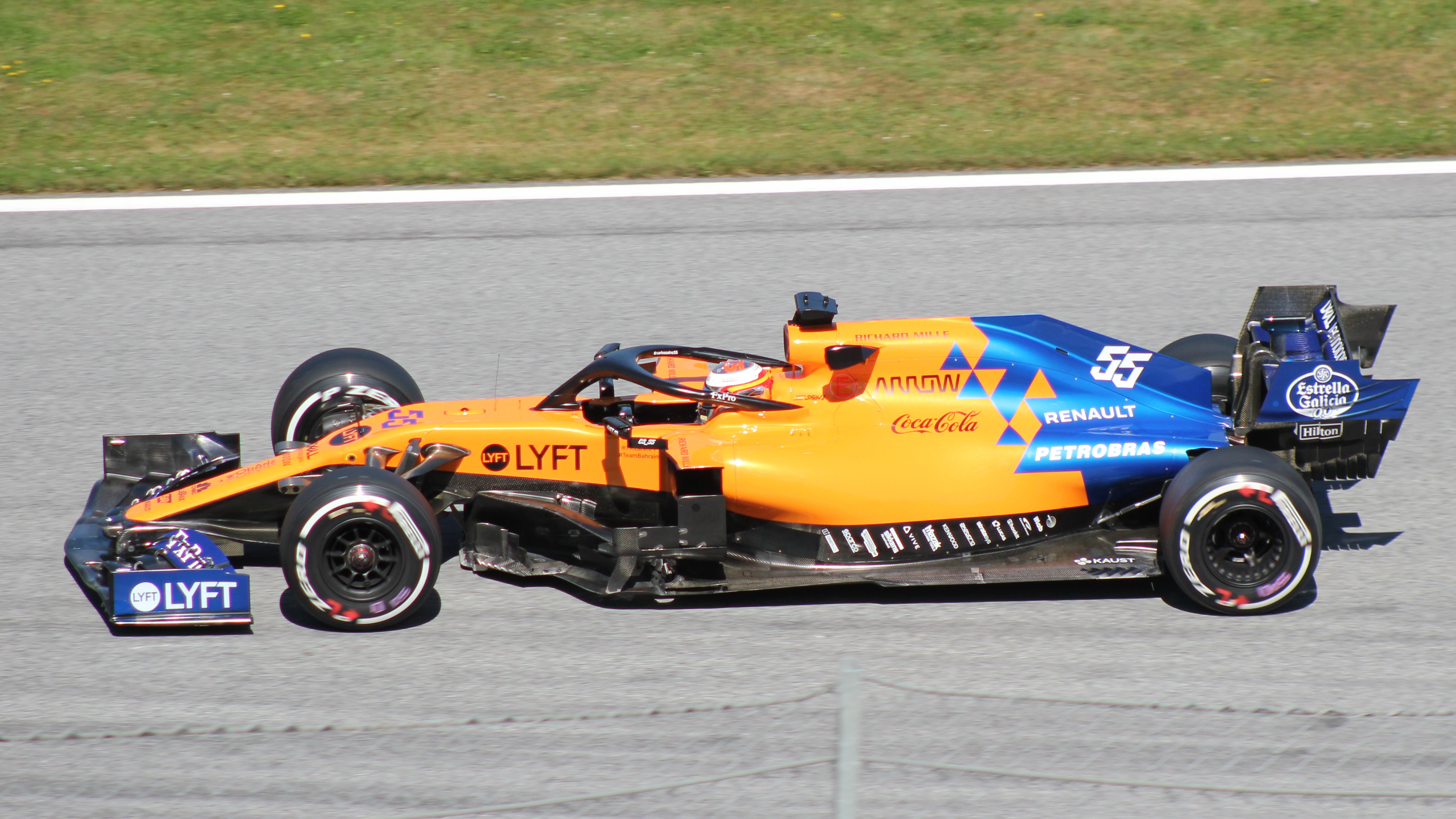 Sainz beim Rennwochenende in Österreich 2019